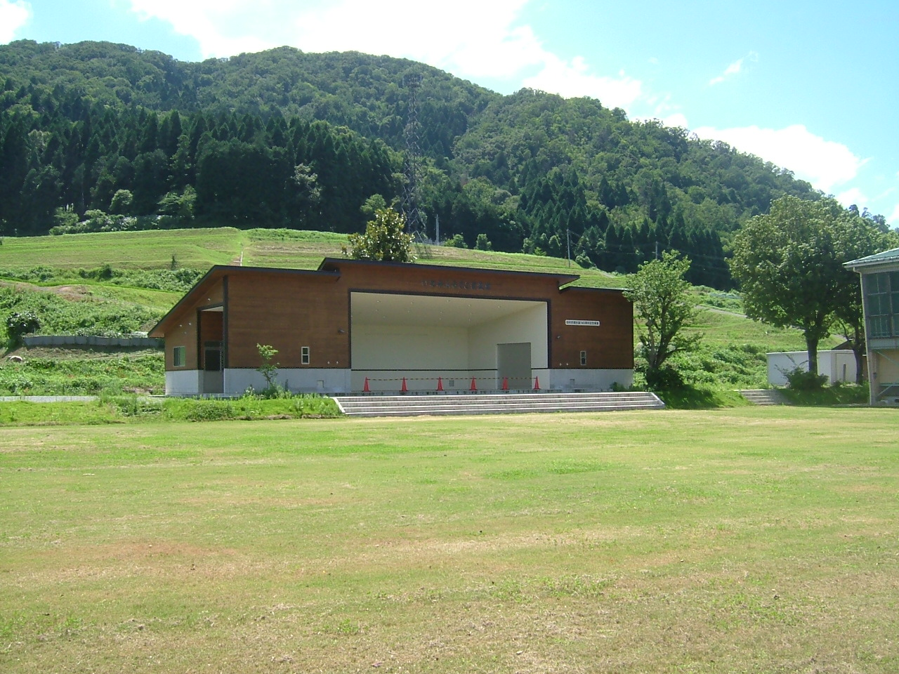 岩美ふるさと音楽堂